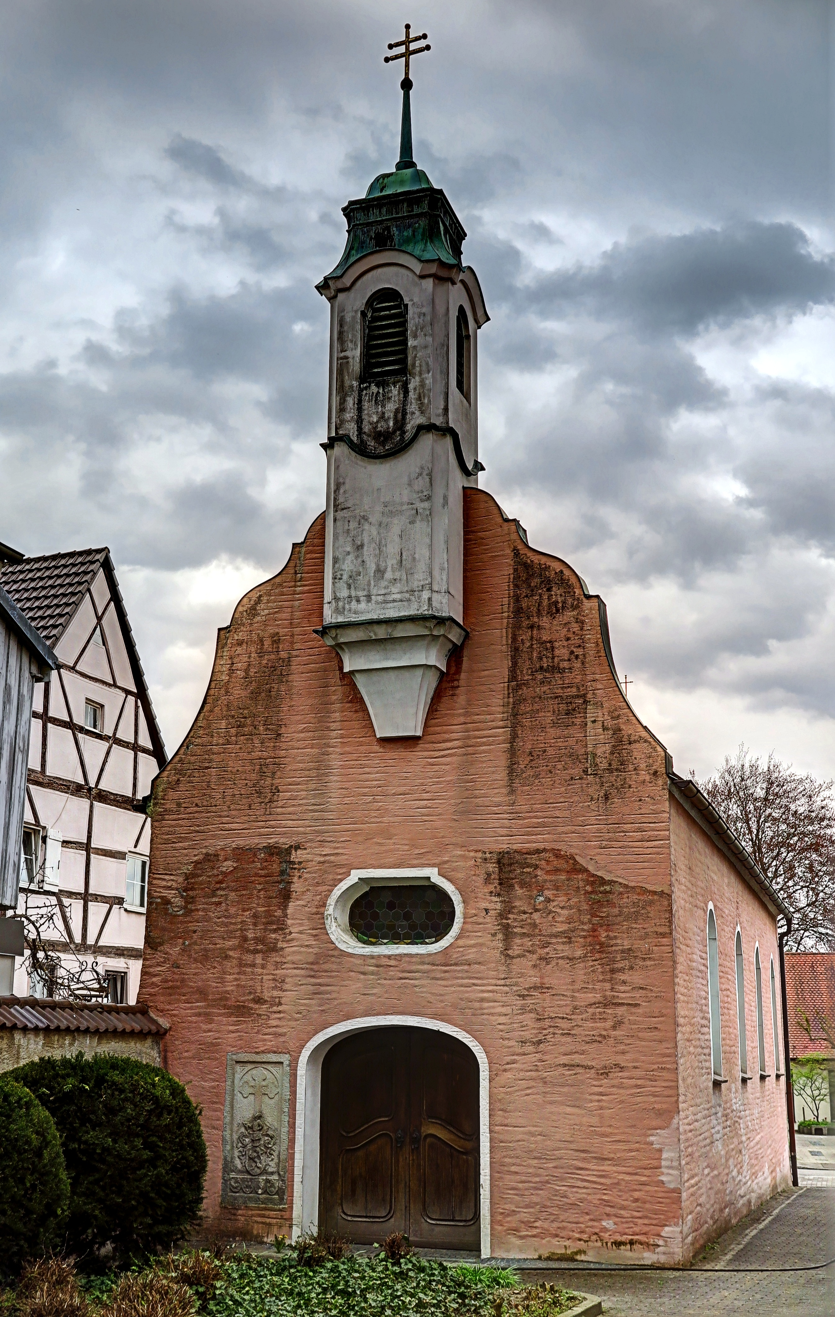 Deutschland, Bayern, Landkreis Dillingen, Wertingen, Seelenkapelle